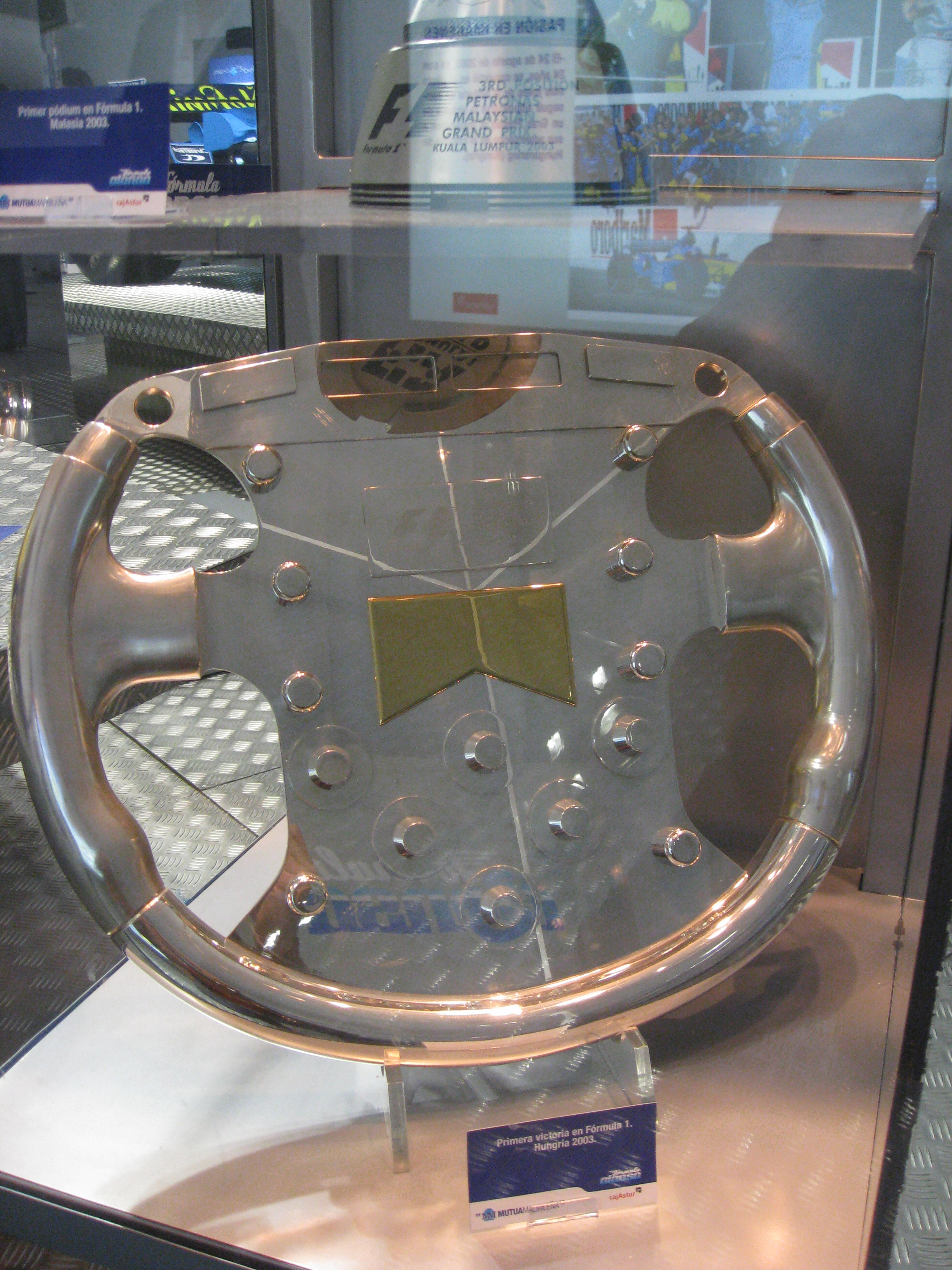 Trofeo primer puesto del gran premio de Hungría